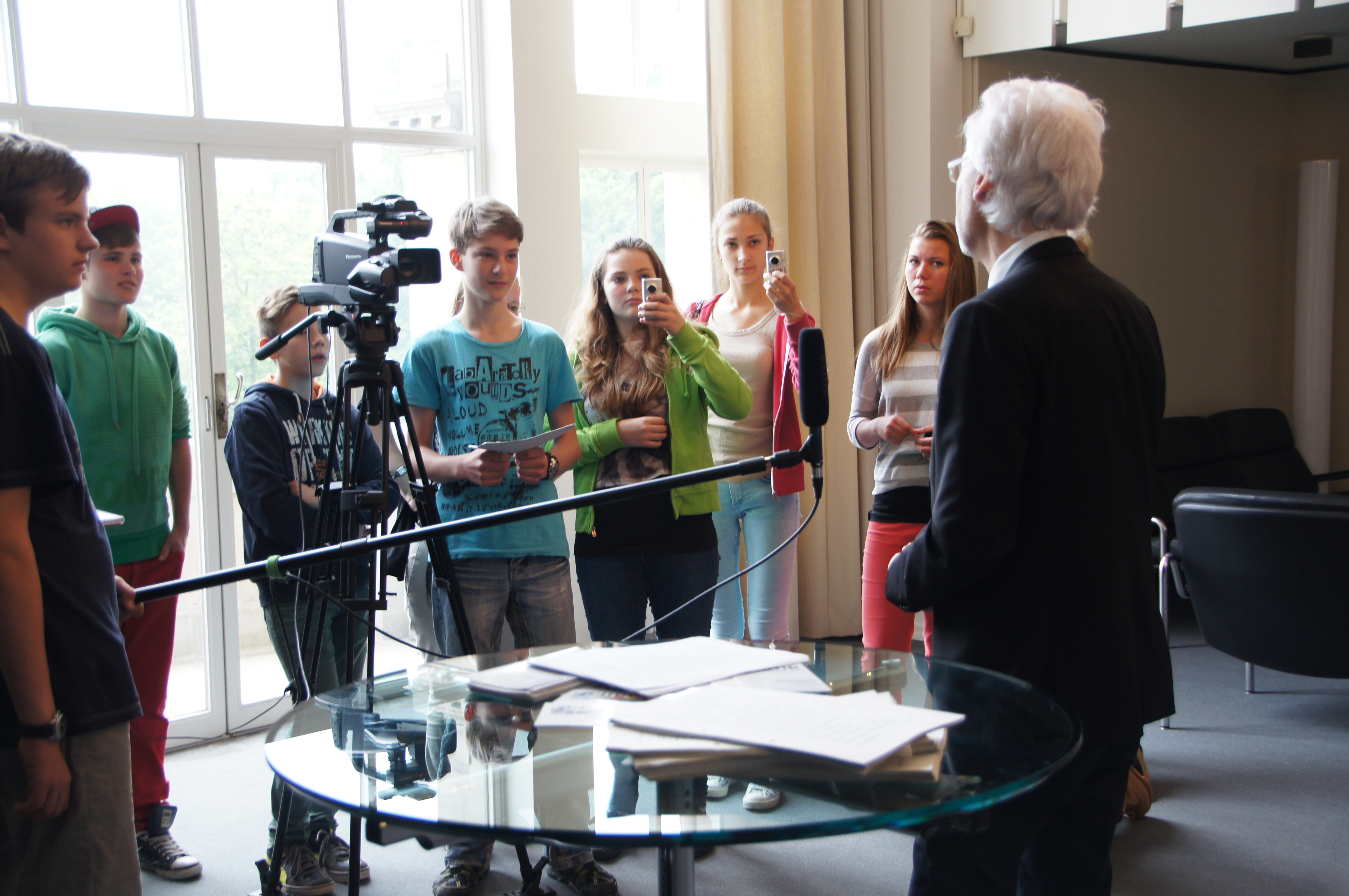 Pimp Your Town! ist ein Planspiel, in dem SchülerInnen in Zusammenarbeit mit der Landeshauptstadt Hannover, Kommunalpolitik erleben können.